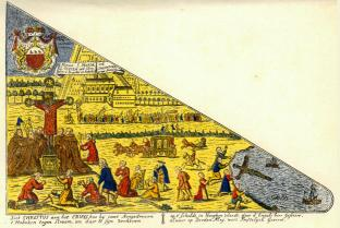 H. Kruis te Hoboken